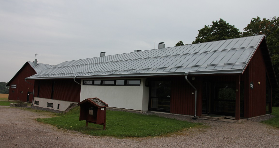 Vantaan maatalousmuseon rakennus, Vantaanlaakso, Vantaa.